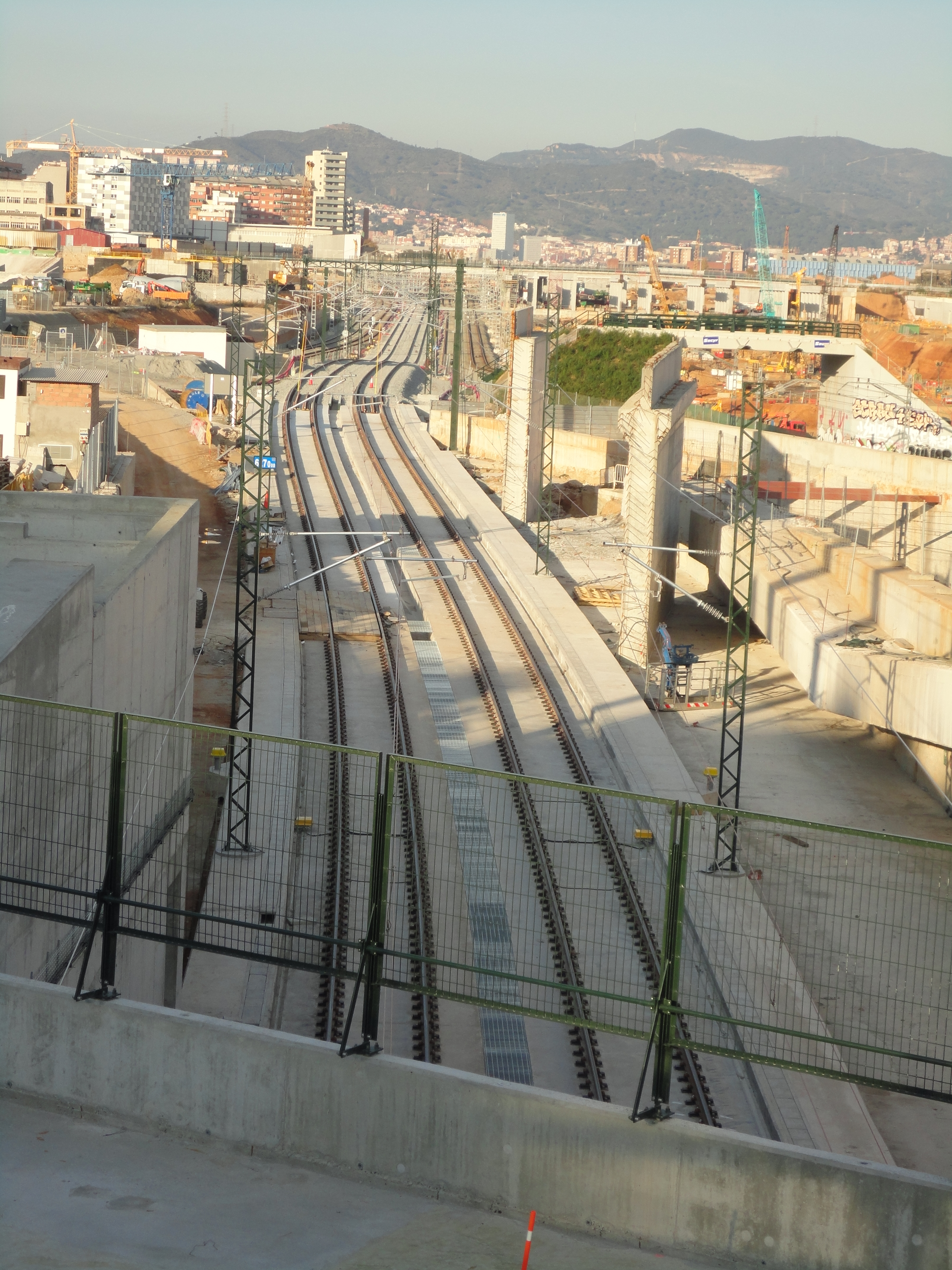 Estació de la Sagrera des del Pont de Bac de Roda.